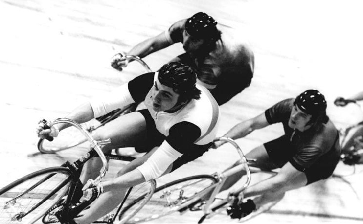 Christian Drescher, Emanuel Raasch, Roland Hennig (b. 1967) ADN-ZB Mittelstädt 10-12-75-str-Berlin: Winterbahn - In der nächsten Runde des 4. Verlaufes im Sprint fällt die Entscheidung. Noch liegt Christian Drescher (TSC Berlin-links) vorn, aber der Bronzemadaillengewinner der vergangenen Weltmeisterschaften, Emanuel Raasch (SC Dynamo Berlin - 2.v.l.), hat nach einem langen Spurt seine Vorlaufgegener bezwungen. Rechts Roland Hennig (SC Cottbus). Bei 22 weiteren Abendveranstaltungen erwartet das Publikum in der Werner-Seelenbinder-Halle ein vielversprechendes und spannendes Radsportprogramm.